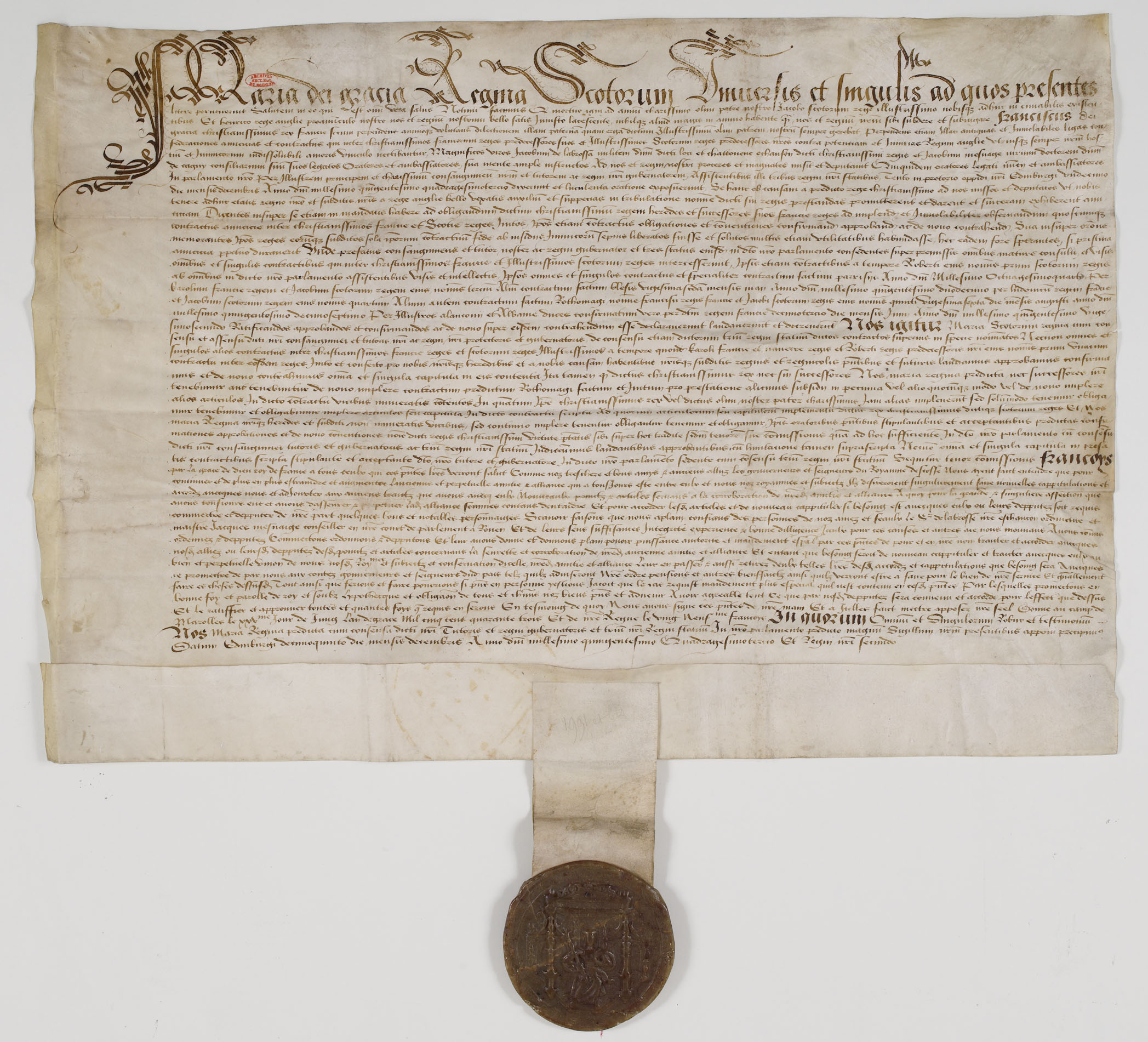 Charte de Marie Stuart par laquelle elle confirme et renouvelle les traités d’alliance conclus entre ses prédécesseurs et les rois de France, donnée à Édimbourg le 15 décembre 1543.Acte en latin, sur parchemin et scellé d'un sceau de cire jaune sur languette de parchemin.